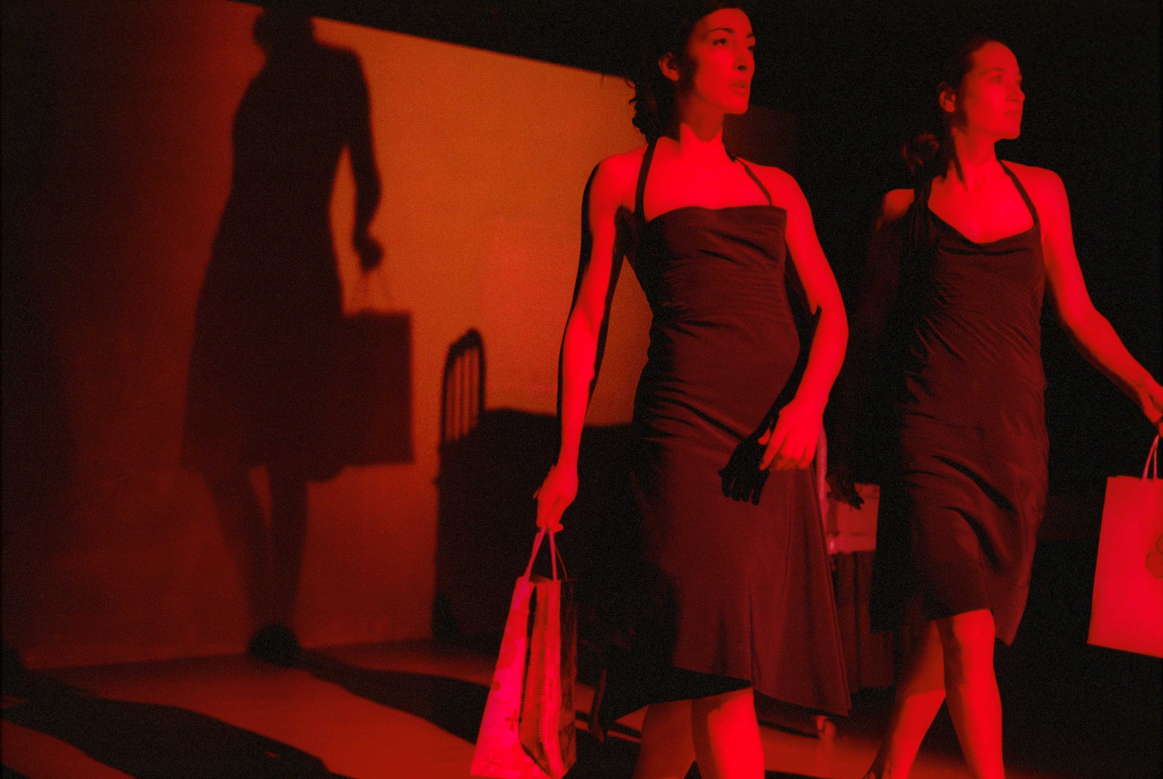 עלית קרייז ואנטון מירטו במיצג Miss did it hurt when you fell down from heaven?